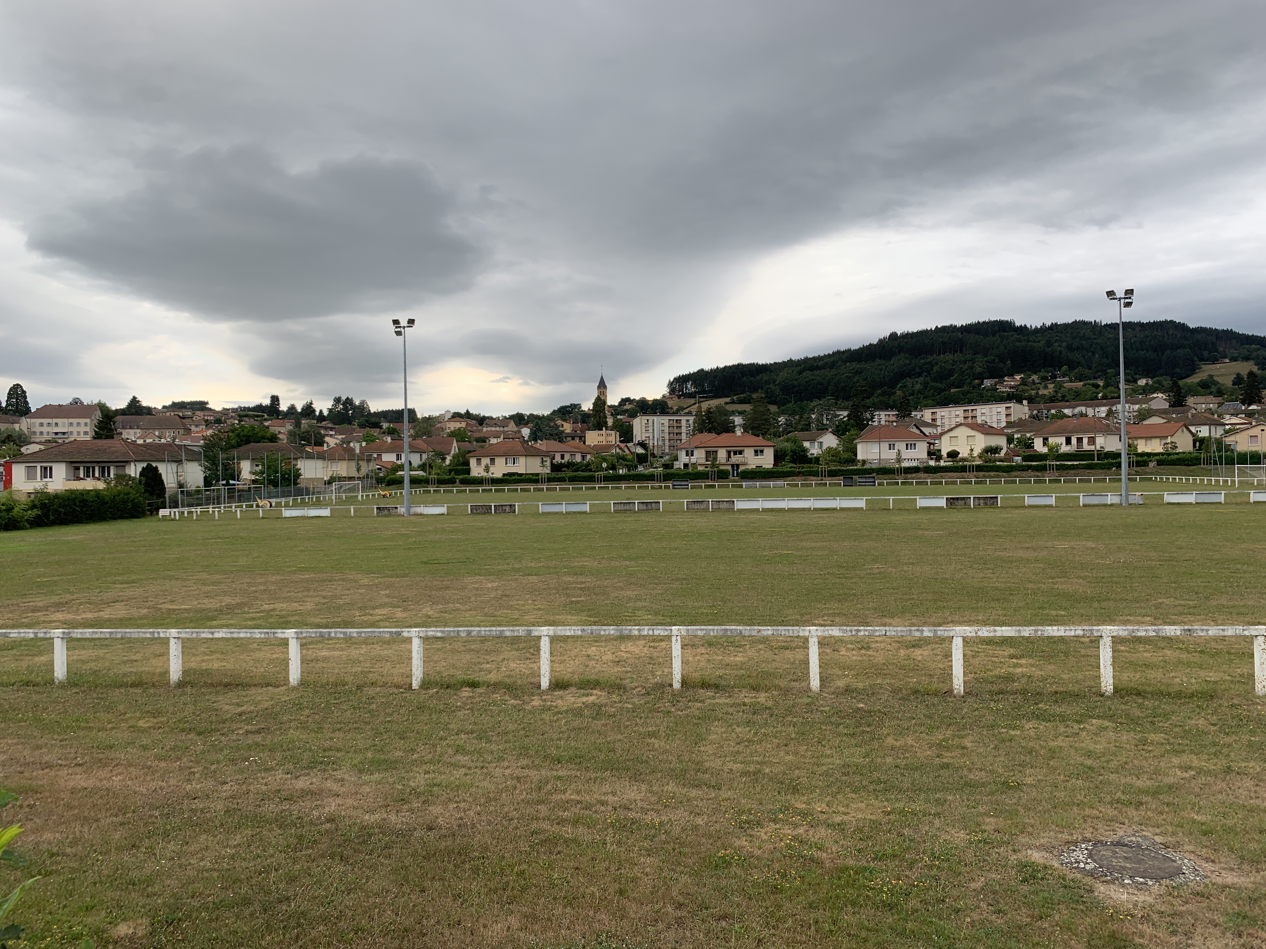 Terrain de football et de rugby situés le long de l'avenue Van de Walle, Chauffailles.